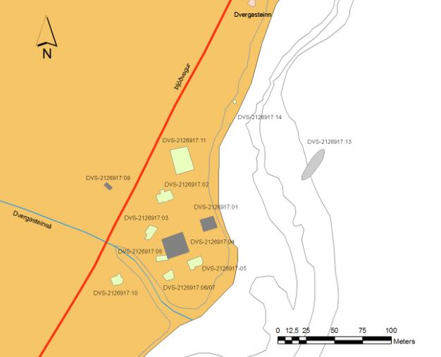 Kort af hvalveiðistöð Norðmanna við Dvergasteinseyri í Álftafirði á Vestfjörðum.